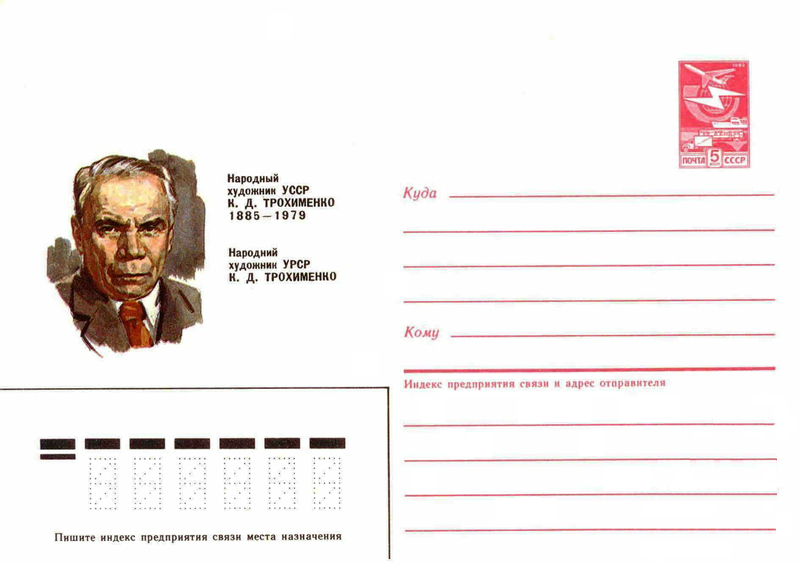 Художественный маркированный конверт СССР 1985 г. в честь 100-летия со дня рождения Трохименко Карпа Демьяновича, народного художника Украинской ССР, педагога, (1885 - 1979)